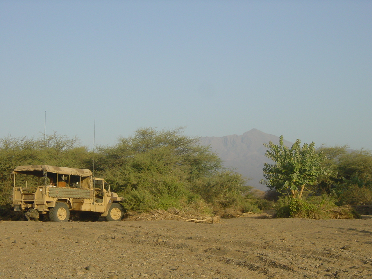 Station radio sur VLRA de la 13e DBLE au pied du Moussa Ali à Djibouti